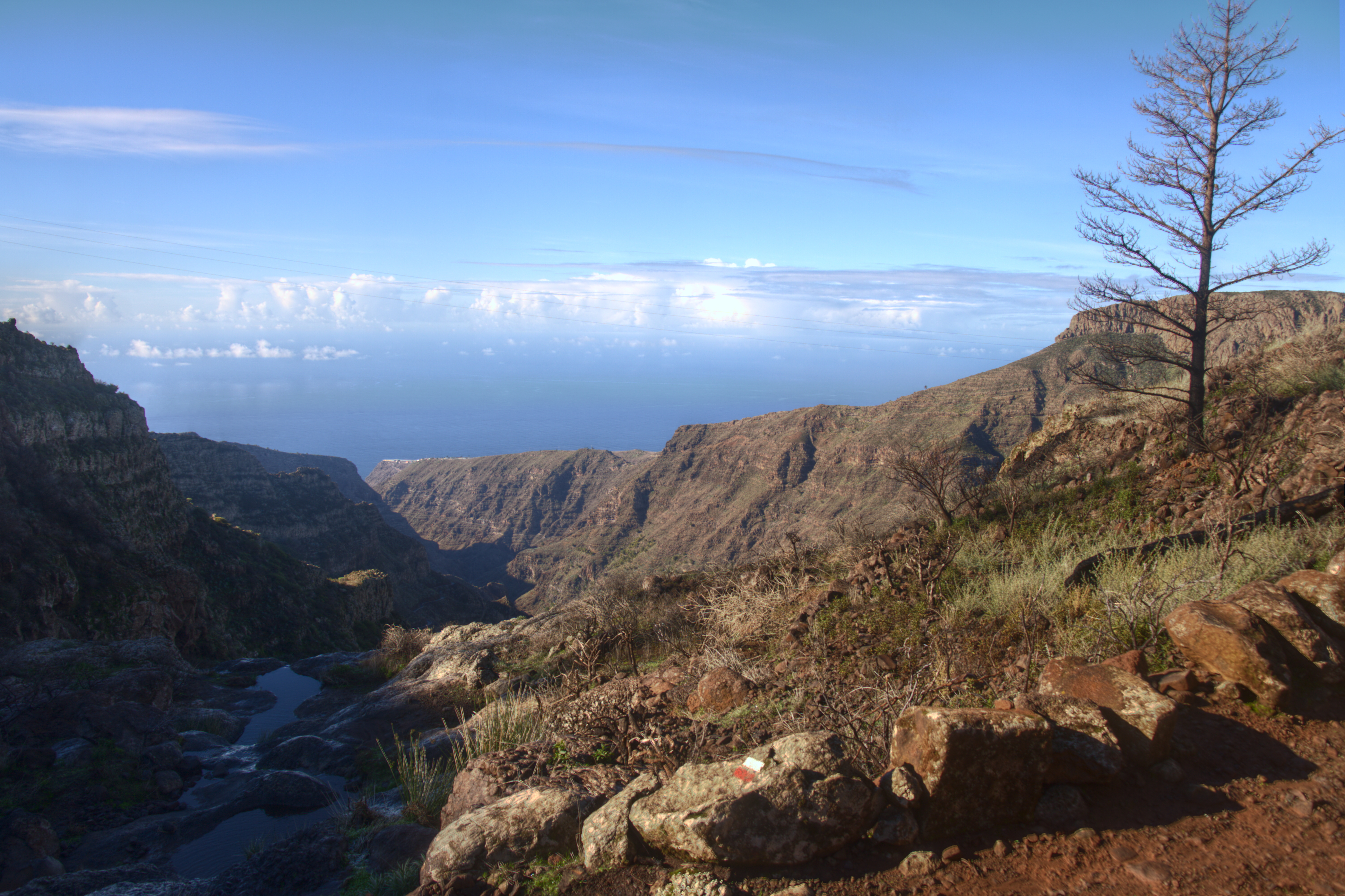 Barranco de Erque visto desde el paso del sendero GR 131 por el Barranco del Agua.